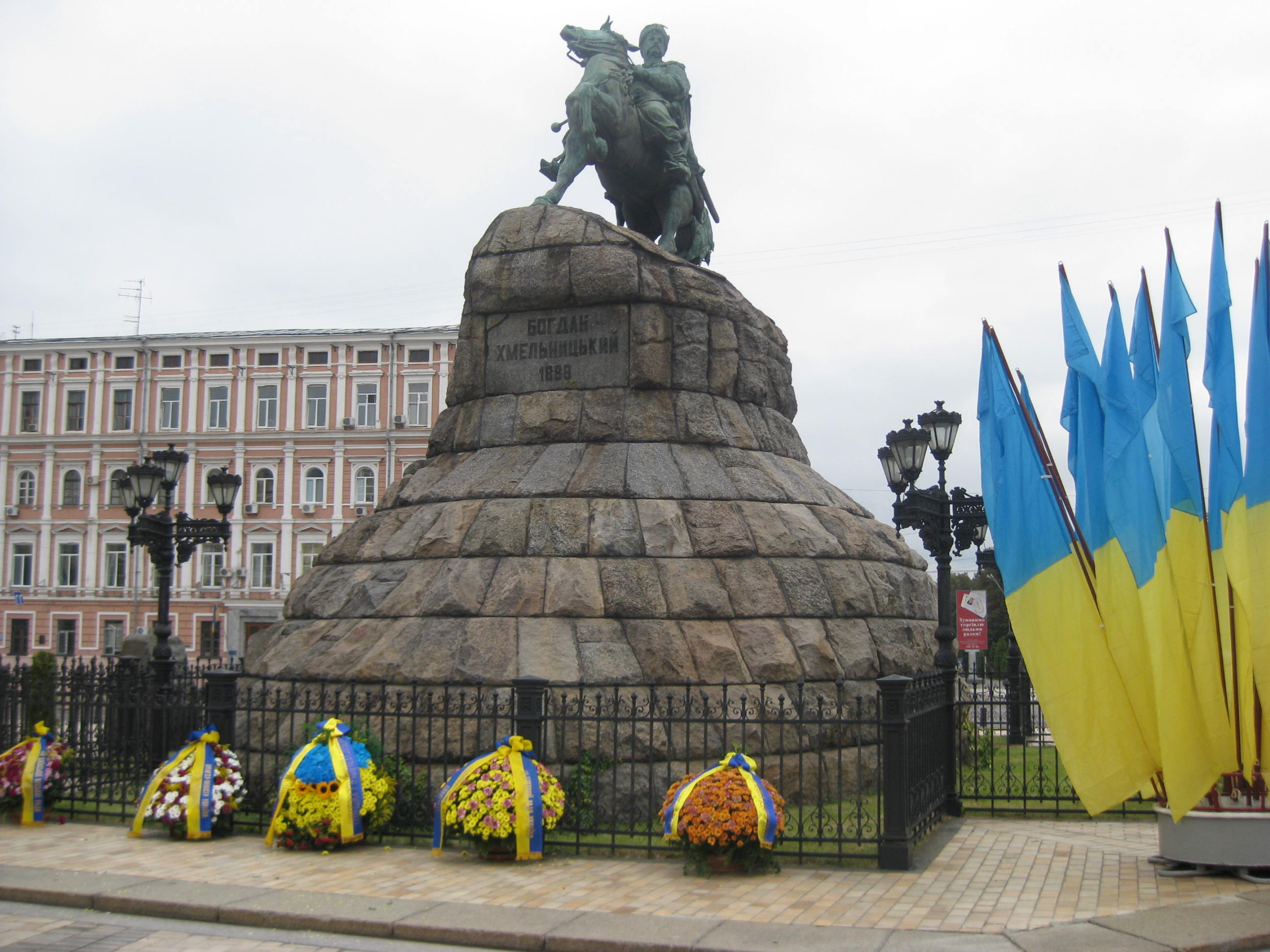 Standbeeld van kozakkenleider Bohdan Chmelnytsky in Kiev, gefotografeerd op de Dag van de Onafhankelijkheid 2009 (24-8)